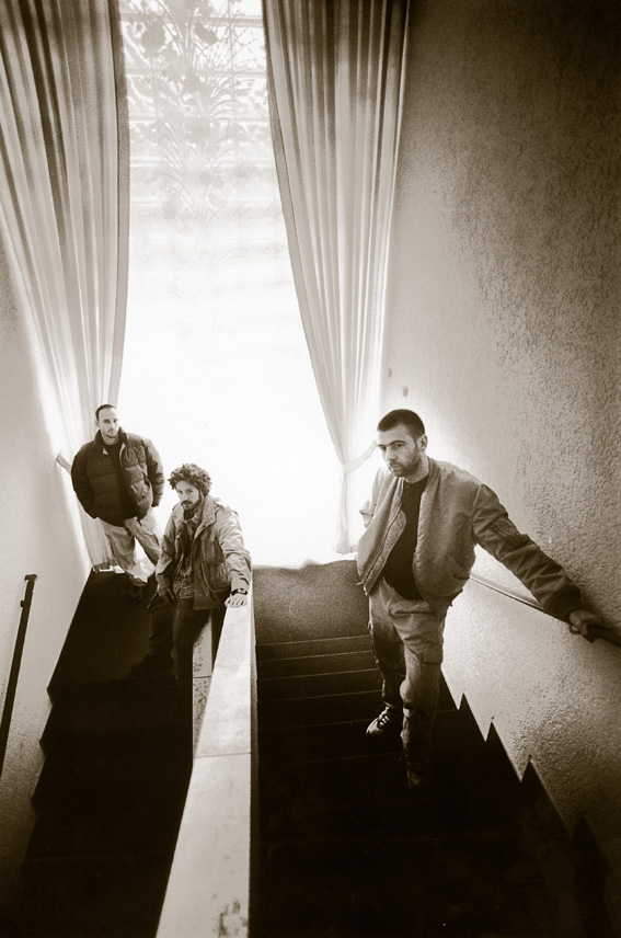 Freundeskreis backstage